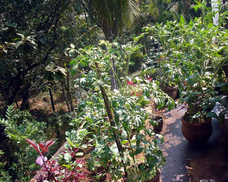 തക്കാളി ചെടികൾ ചെടിചട്ടിയിൽ